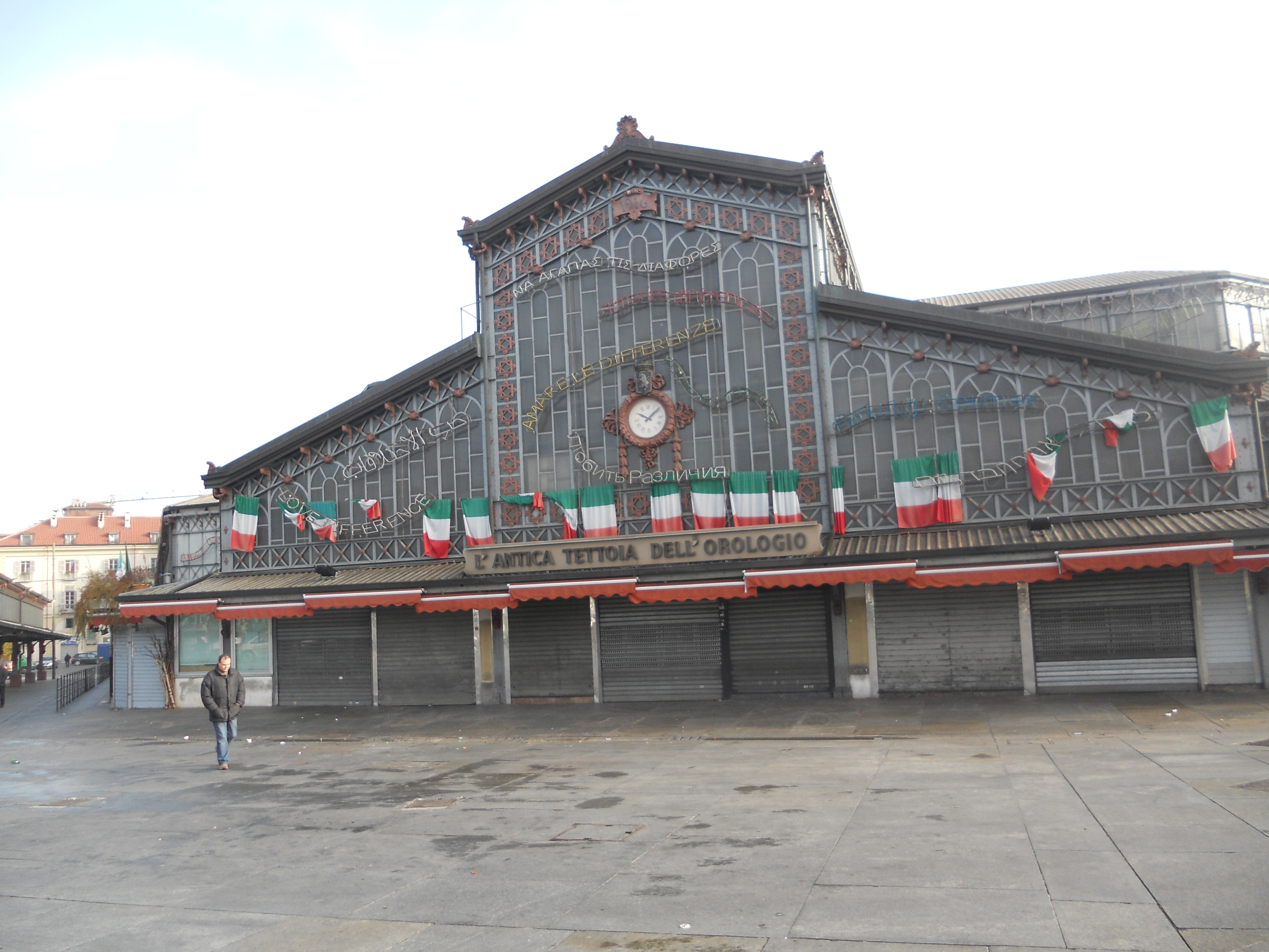 edificio mercato di Porta Palazzo